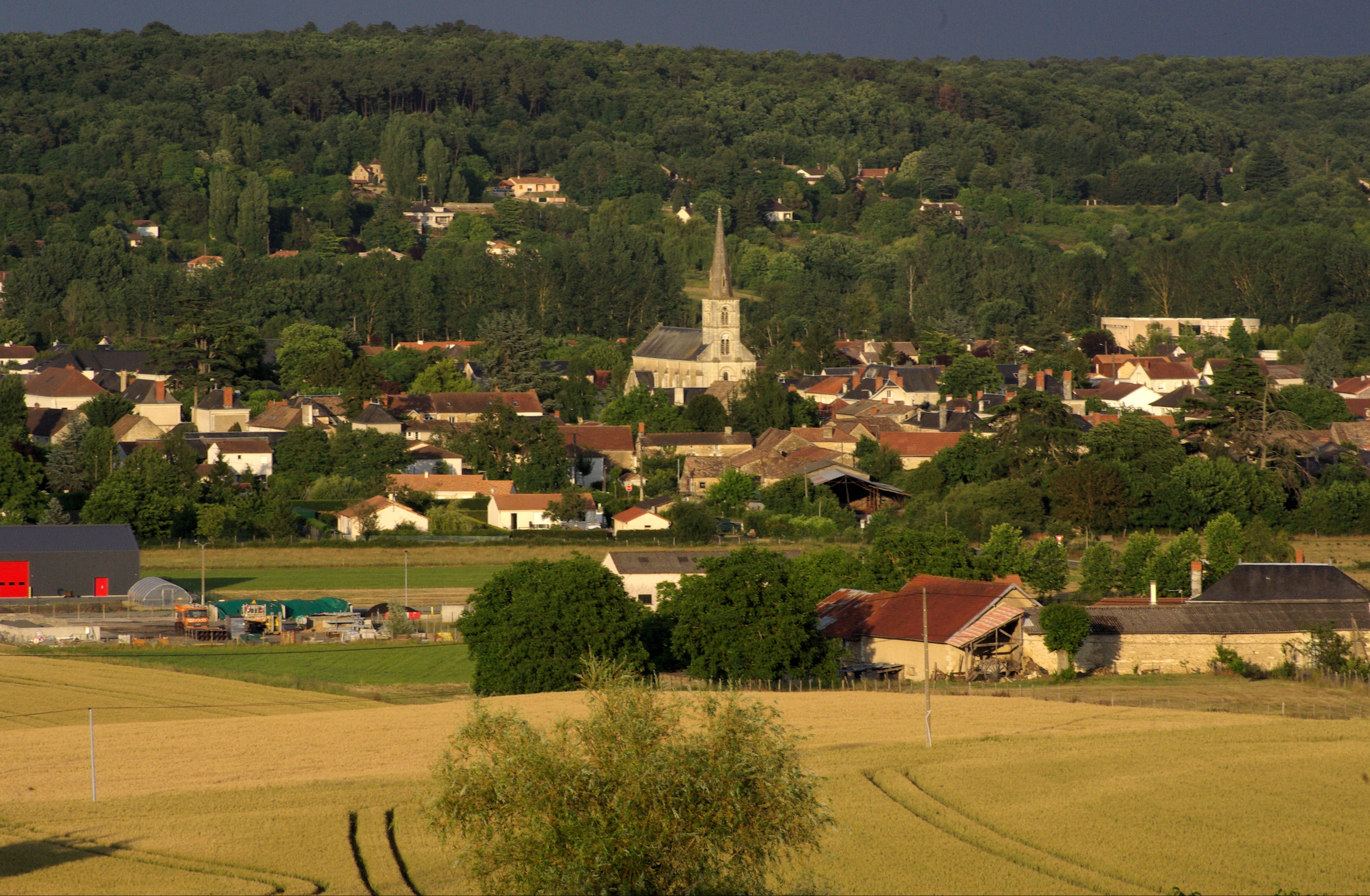 Une vue du village de Vouneuil-sur-Vienne.